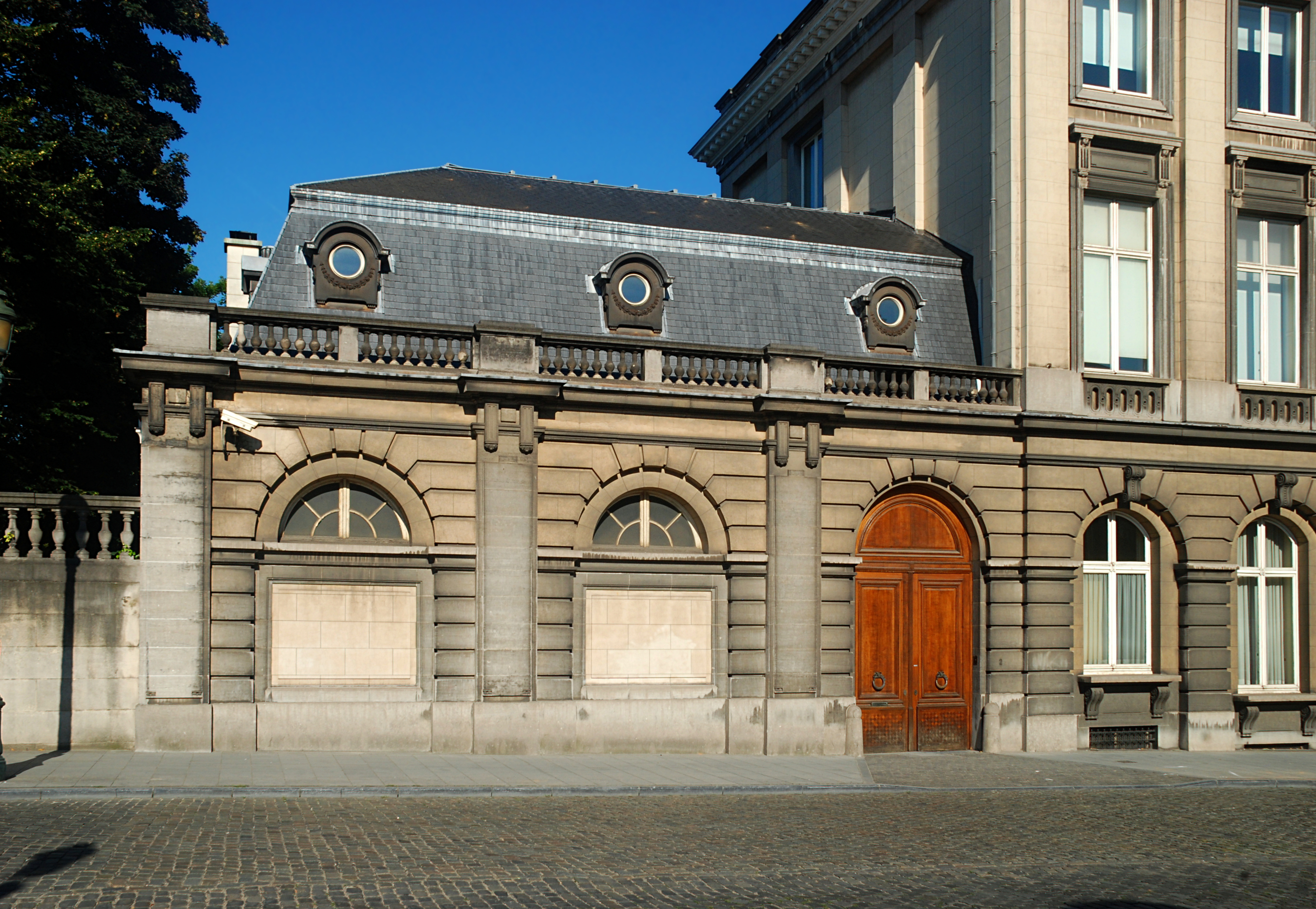 Belgique - Bruxelles - Hôtel de la Liste civile